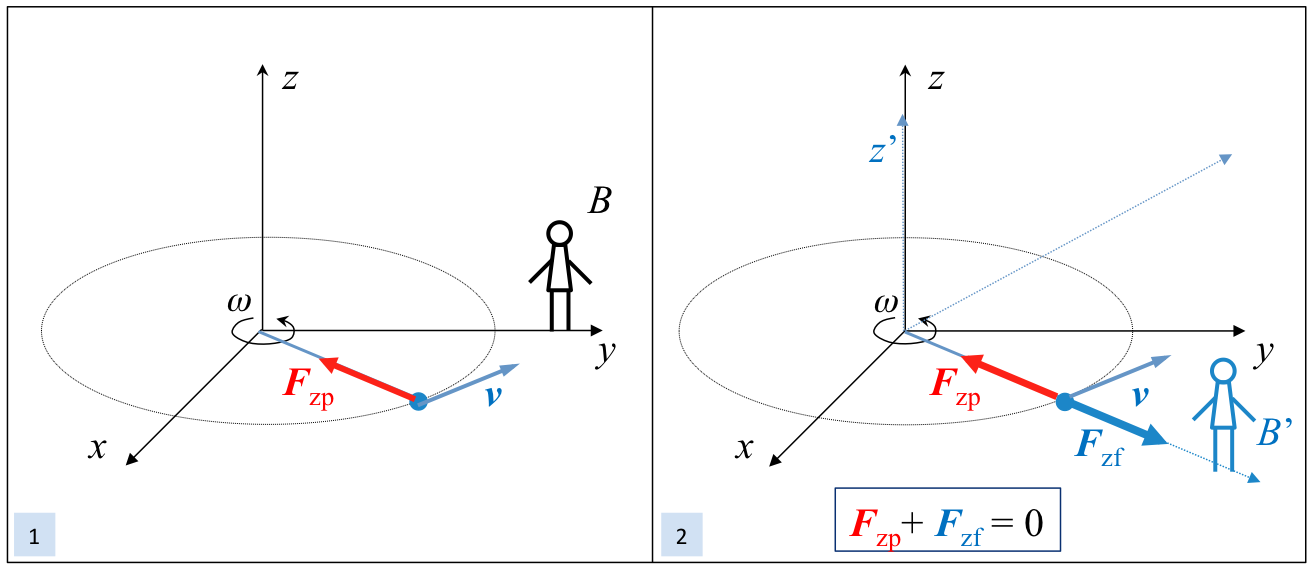 Higidura zirkularreko indar zentripetua sistema inertzial eta sistema ez-inertzial batean adierazten duen eskema grafikoa.